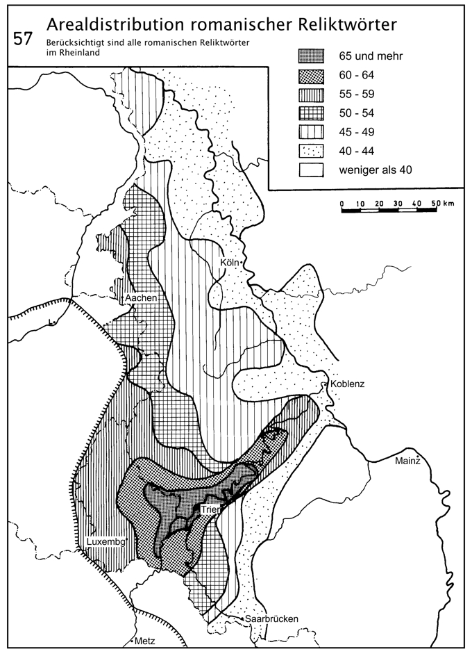 Karte mit der Häufigkeitsverbreitung von romanischen Reliktwörtern im Rheinland. Nach: Rudolf Post: Romanische Entlehnungen in den westmitteldeutschen Mundarten. Steiner, Wiesbaden 1982, S. 303